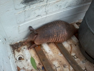 O tatu-mulita (Dasypus hybridus) é um pequeno tatu campestre, encontrado no Paraguai, Argentina, Uruguai e Sul do Brasil. É uma espécie semelhante ao tatu-galinha, tendo uma carapaça alta e ovalada e cabeça comprida, com orelhas altas e inclinadas para trás.